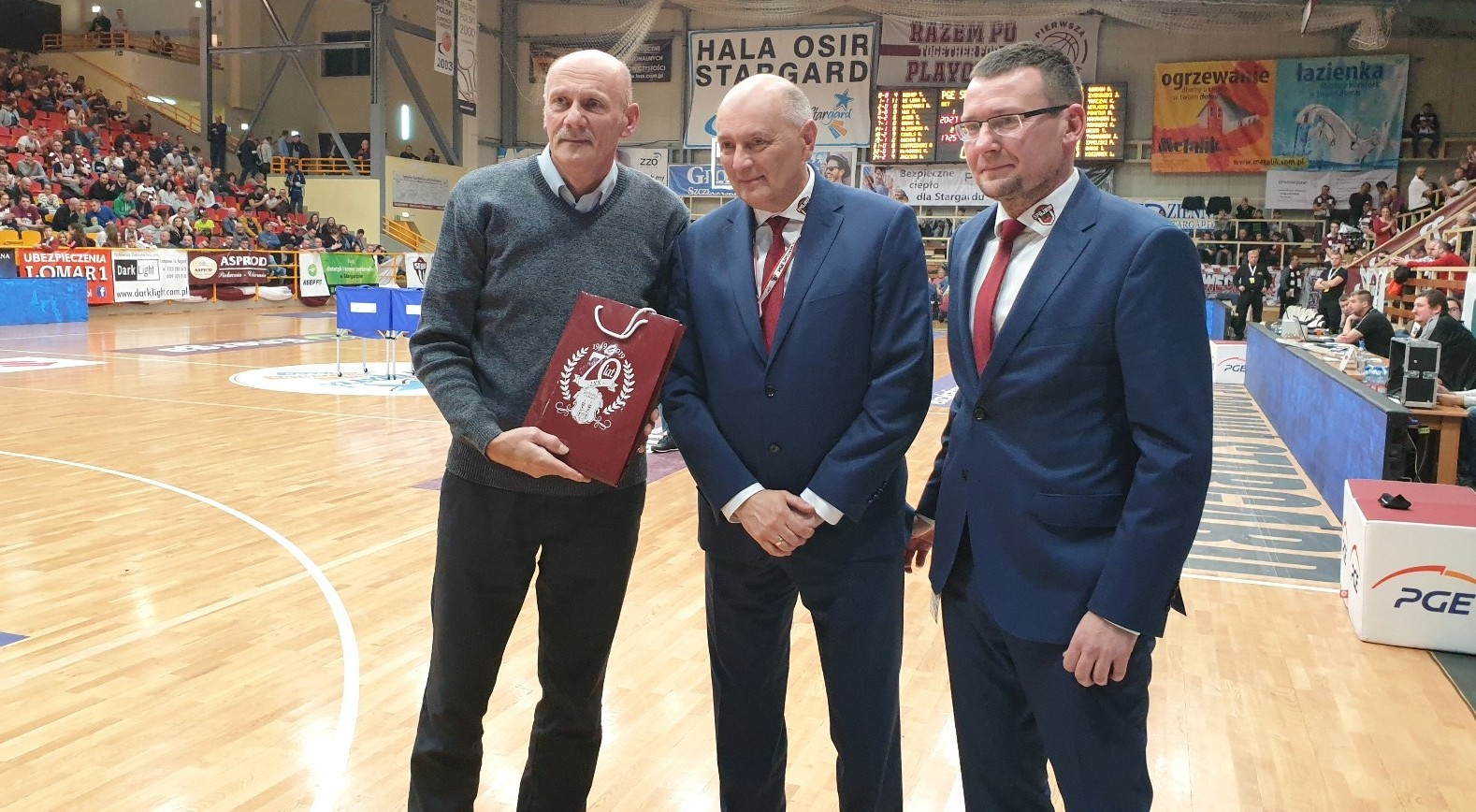 70 lecie Spójni Stargard. Wyróżnienie przez zarząd Grzegorza Żyłczyńskiego